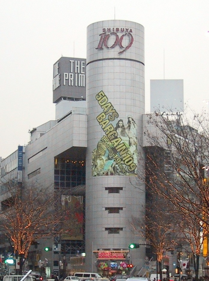 Shibuya 109 Building in Tokyo; January 2006